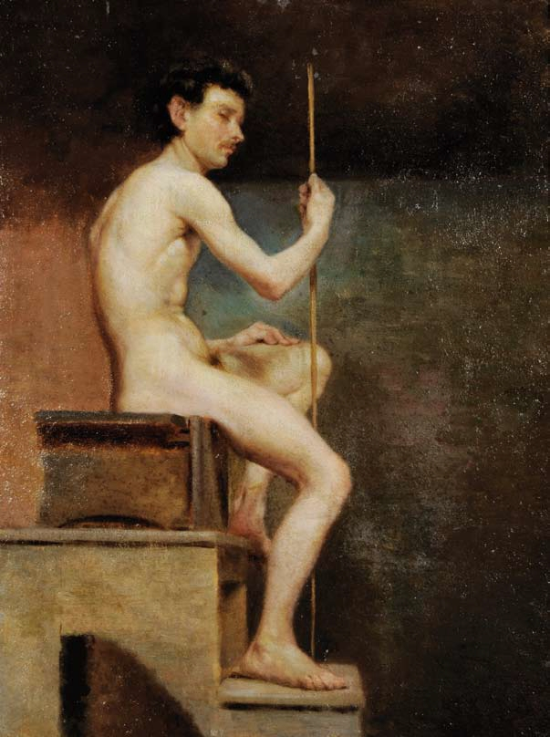 Francesco Filippini. Studio di nudo virile (1876)